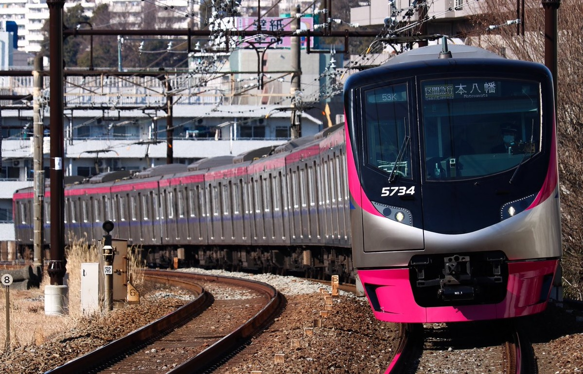 京王5000系5734編成 京王多摩センター - 京王永山にて Nikon D7200